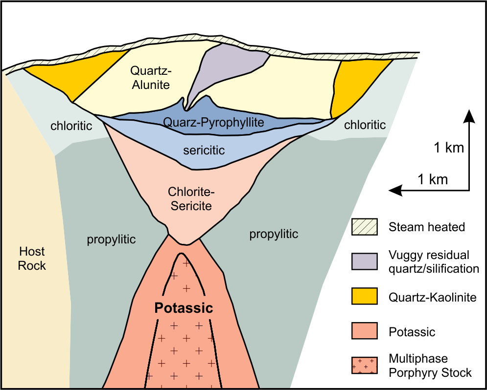 Schematischer Querschnitt durch eine Porphyrische Kupferlagerstätte mit der Abfolge von hydrothermalen Alterations-Zonen rund um die Intrusion. Zeichnung unter Zugrundelegung einer Vorlage in Richard H. Silitoe (2010): Porphyry Copper Systems. - Economic Geology, Band 105, S. 3–41.